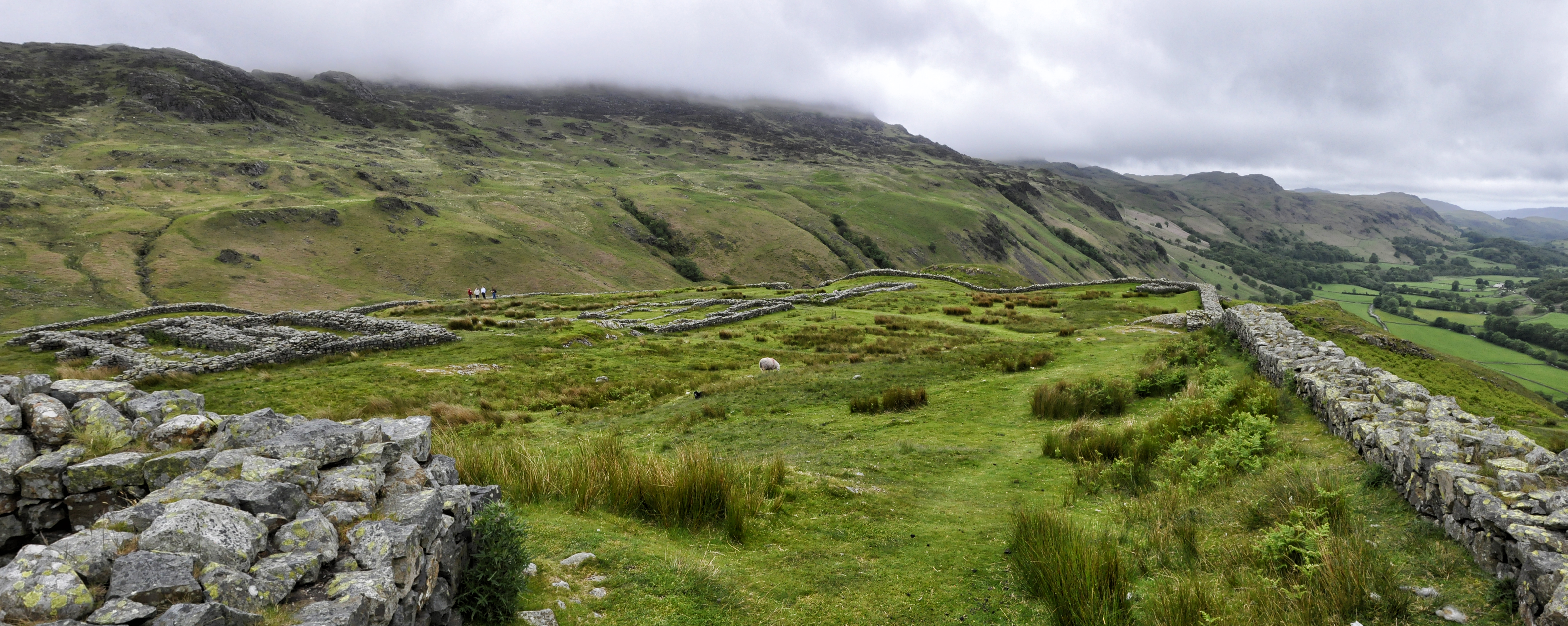 Hardknott Roman Fort langs de Hardknott Pass, Lake District, Engeland